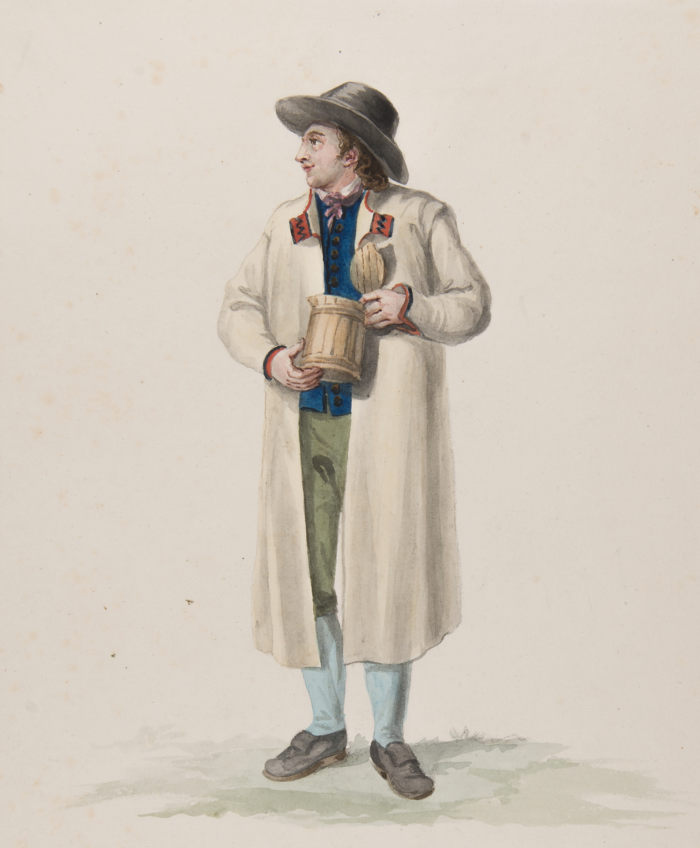 Dräkt. "Habitant de la Paroisse de Wingåker" . Man i dräkt i helfigur. Akvarell i storformat av C.W. Swedman. Text på monteringen: "Jfr 'Costume of Sweden' " Depicted place: Q10610926 (Q10610926) (Härad), Vingåker sn (Ortnamn därutöver), Södermanland (Q626062)